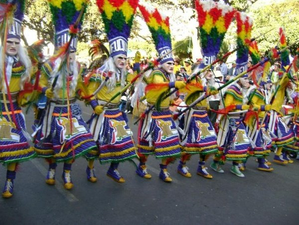 Tobas Neuquen